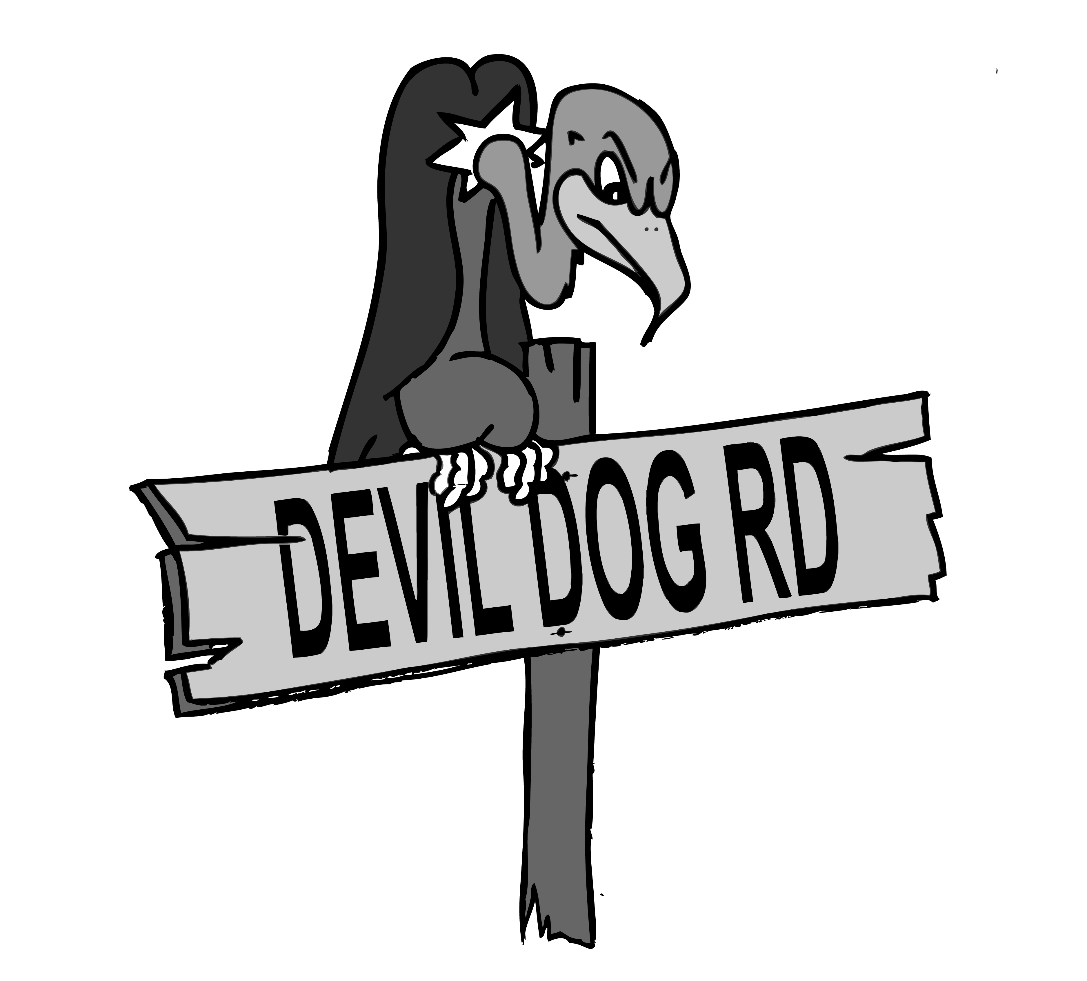 Devil Dog Road (2014) kansi